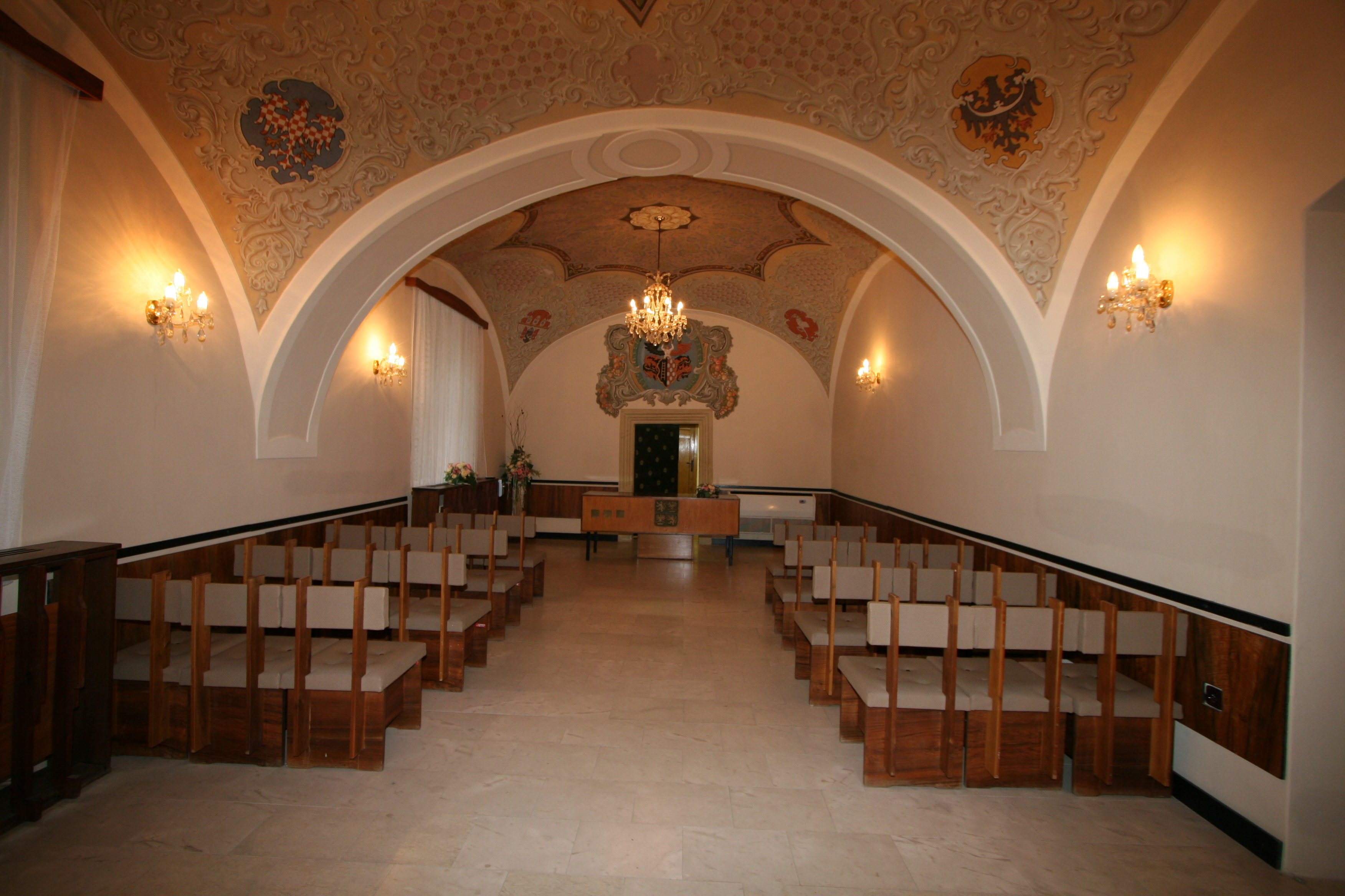 Radnice (Lázně Bohdaneč), Langrova 1, Lázně Bohdaneč